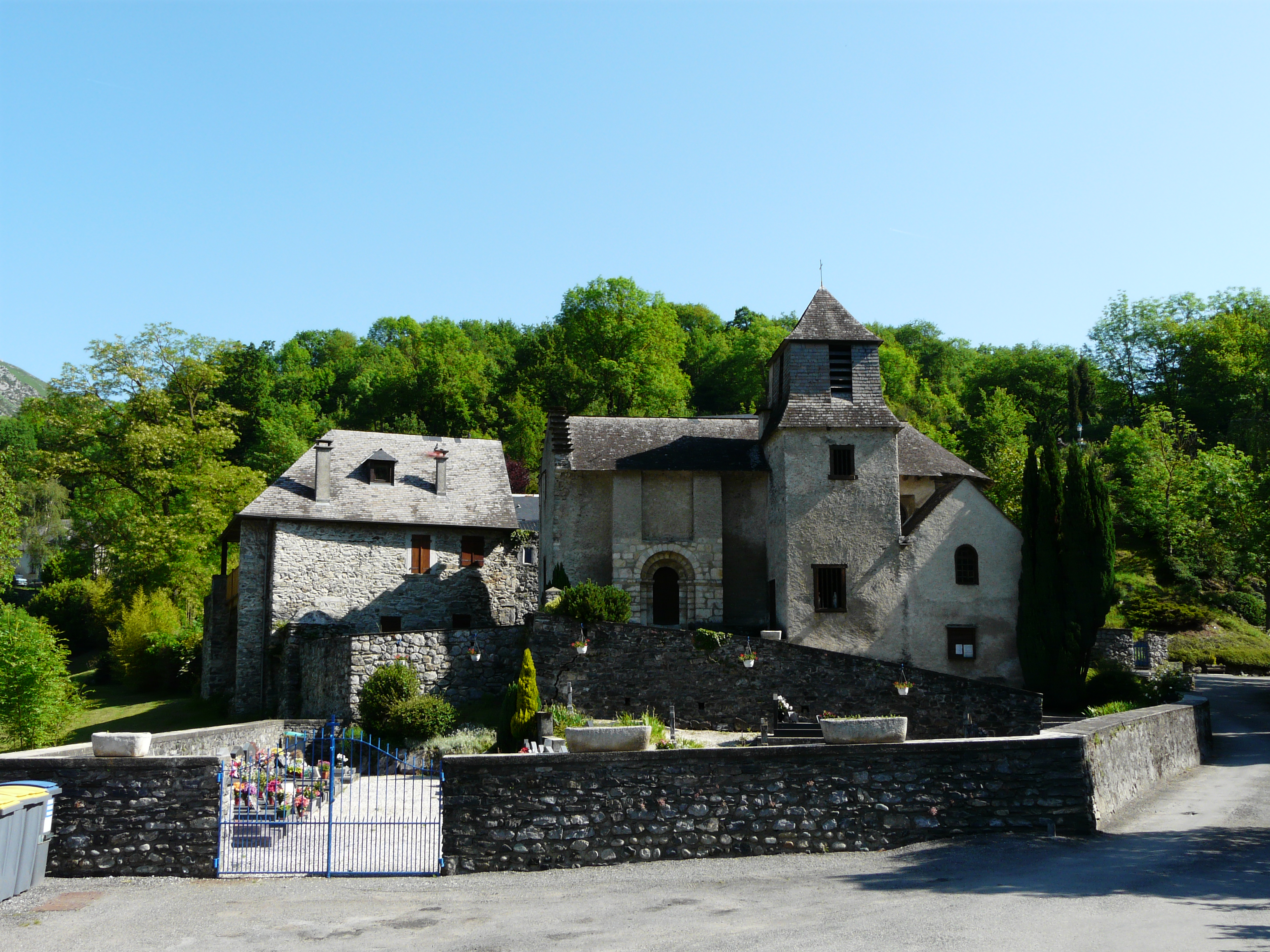 Le côté sud de l'église Saint-Martin de Geu, Hautes-Pyrénées, France.